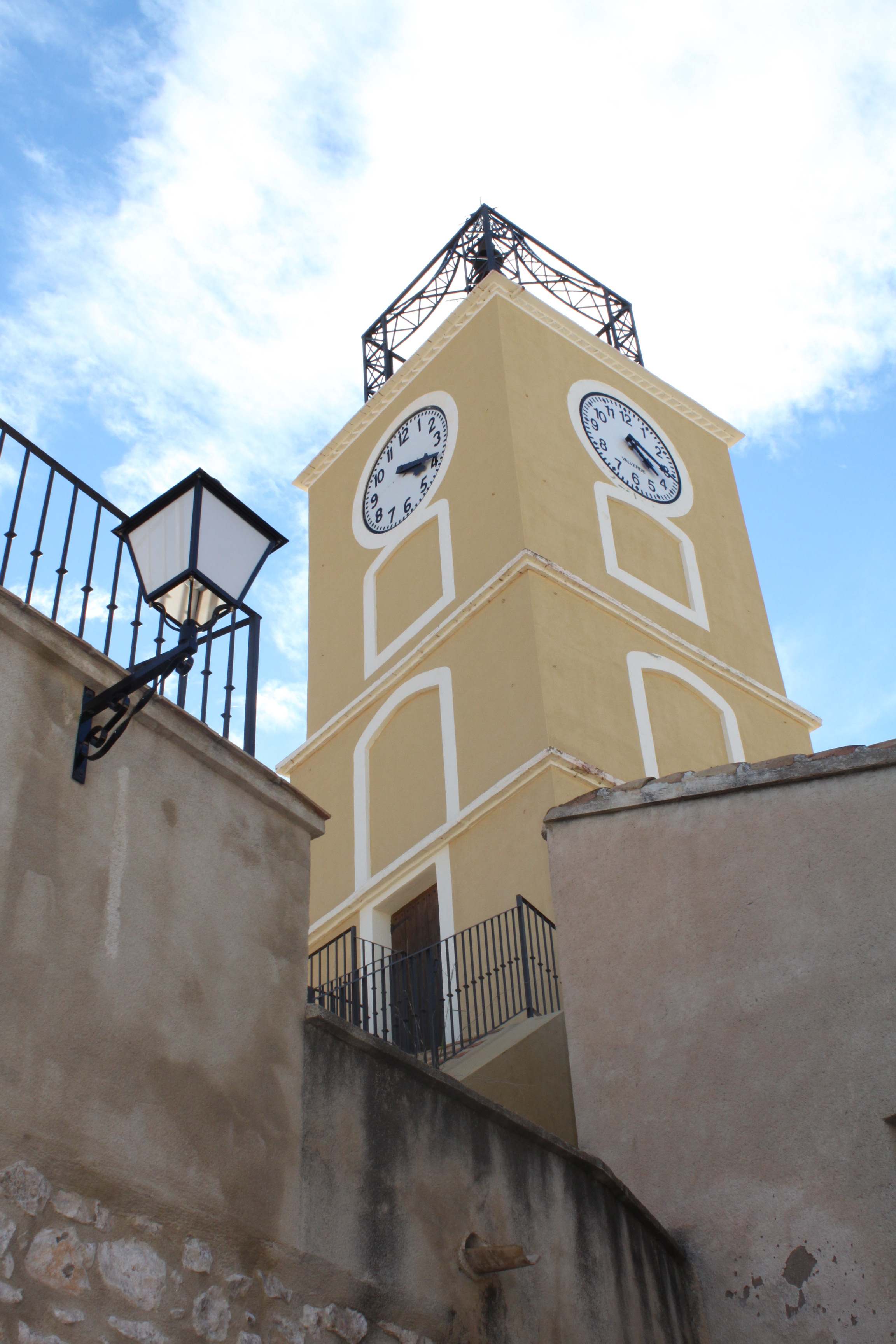 Torre del Reloj de Pliego (Región de Murcia, España)